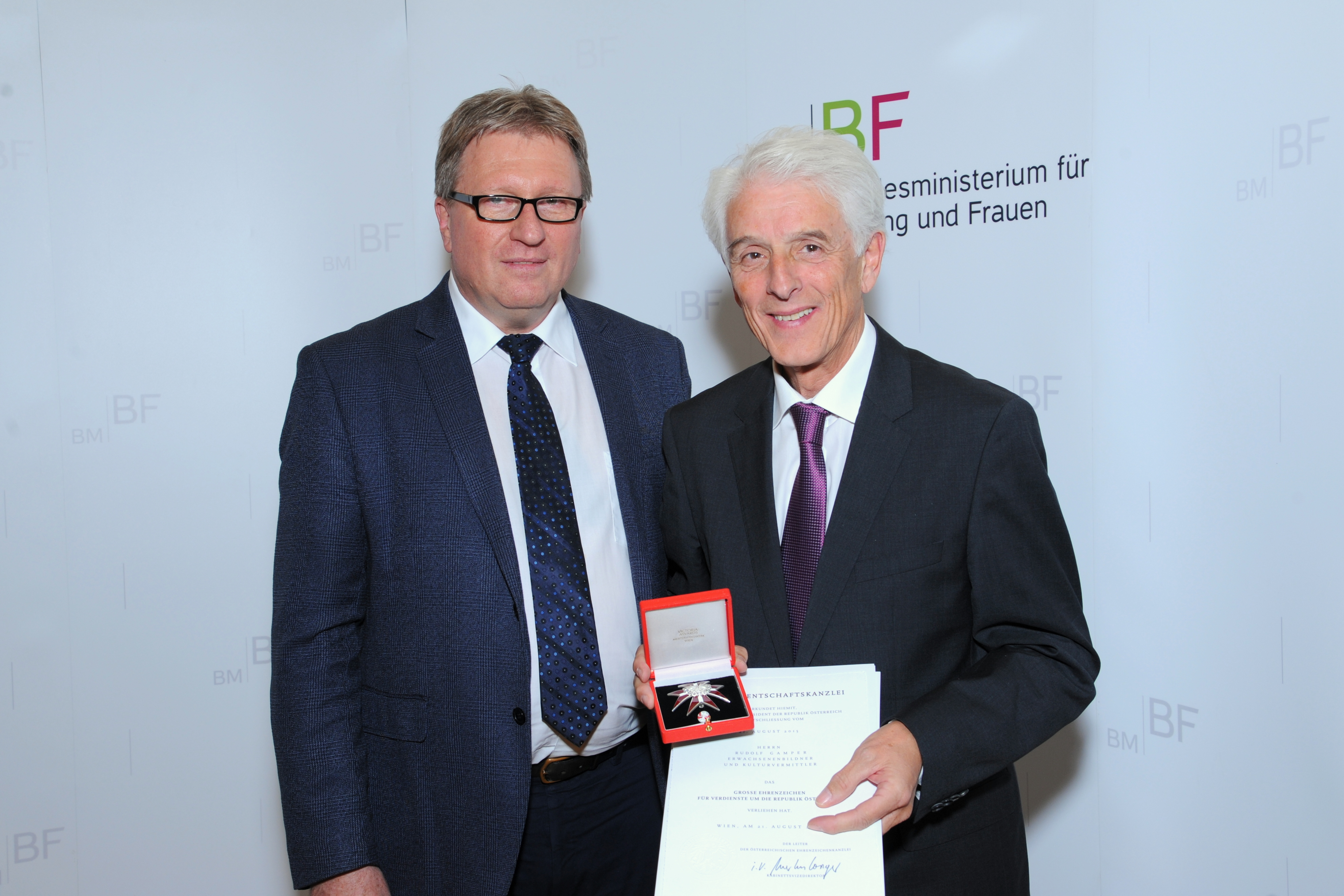 Rudi Gamper bei der Verleihung in Wien